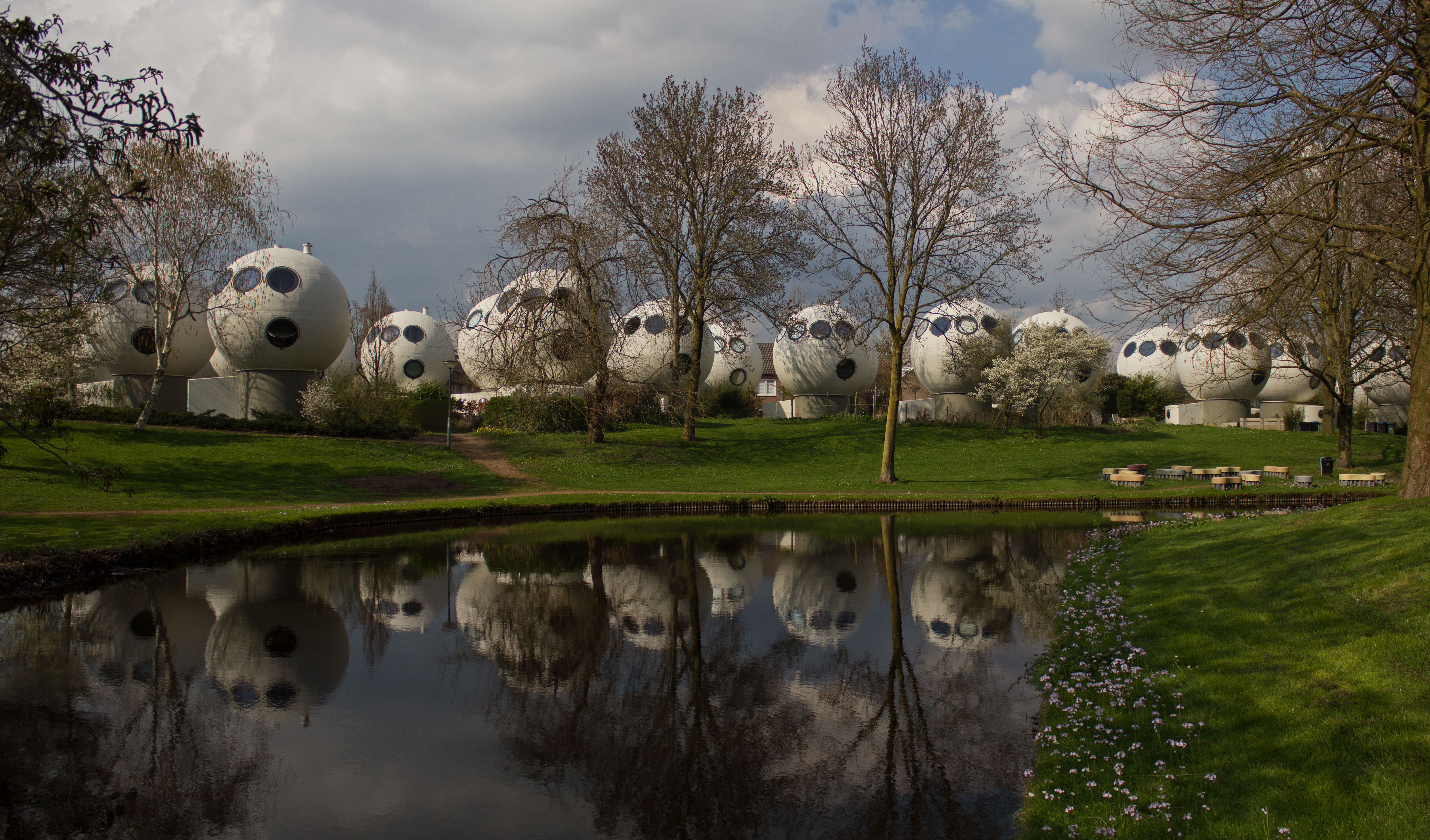 De bolwoningen zijn bolvormige woningen op een kolom in de Maaspoort te 's-Hertogenbosch. Ze werden eind jaren 1970 ontworpen door Dries Kreijkamp en gebouwd in de jaren 1980. De vijftig woningen zijn de laatste woningen die werden betaald uit de subsidies voor experimenteel bouwen, zoals die in 1968 werden ingesteld. Werden bij andere experimenten nieuwe indelingen of een nieuwe sociale omgeving uitgeprobeerd, hier ging het vooral om de vorm van de woningen, zoals ook bij de kubuswoningen in Helmond en elders het geval is. De bijna buitenaardse vormen worden nog eens extra benadrukt doordat ze aan de rand van een gewone nieuwbouwwijk staan. De bolwoning leverde ook een onconventionele en afwijkende plattegrond op. Toilet en badkamer zijn in het midden van de bol geplaatst, de woonkamer is boven gelegen en de slaapkamers beneden. Door bemoeienis van de betrokken woningcorporatie en vanwege de plaatselijke wet- en regelgeving diende Kreijkamp aanpassing op aanpassing uit te voeren en ging veel van de aanvankelijke glans verloren. Zo werden de bollen voor de brandveiligheid uitgevoerd in vezel versterkt cementbeton in plaats van polyester. De vloeren werden van beton in plaats van hout. Aan de bol werd een cilindervormig basement toegevoegd met entreehal in plaats van dat mensen direct in de bol zouden binnenkomen. Bronnen